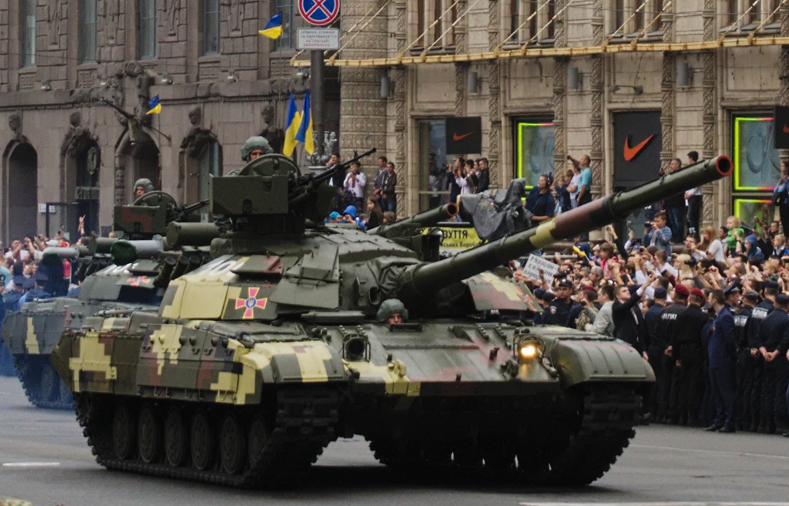 Танк Т-64БМ "Булат" 1-ой танковой бригады.